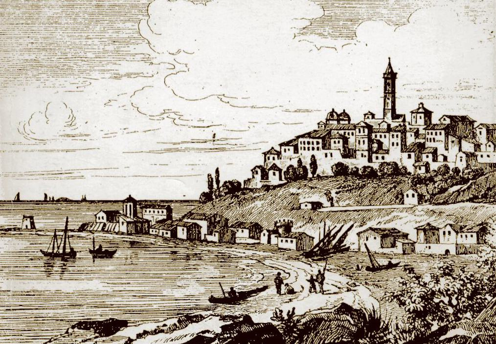 Porto Maurizio all'inizio dell'800 (Imperia, Italy)